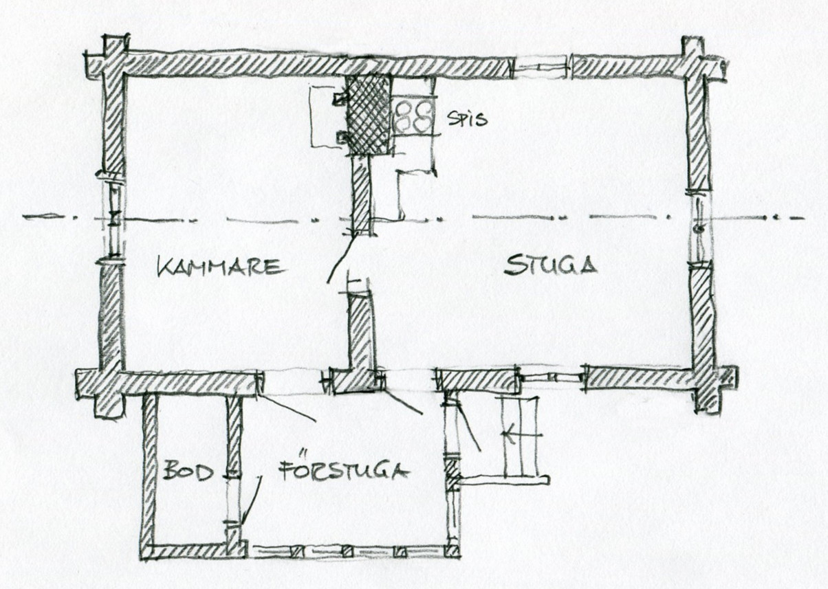 Sidokammarstuga planritning